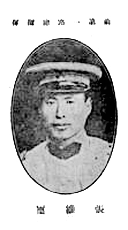 張維璽